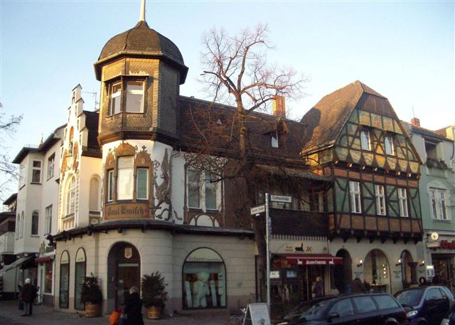 Villenkolonie Berlin Lichterfelde West Westbazaar, sog. "Emisch-Haus"